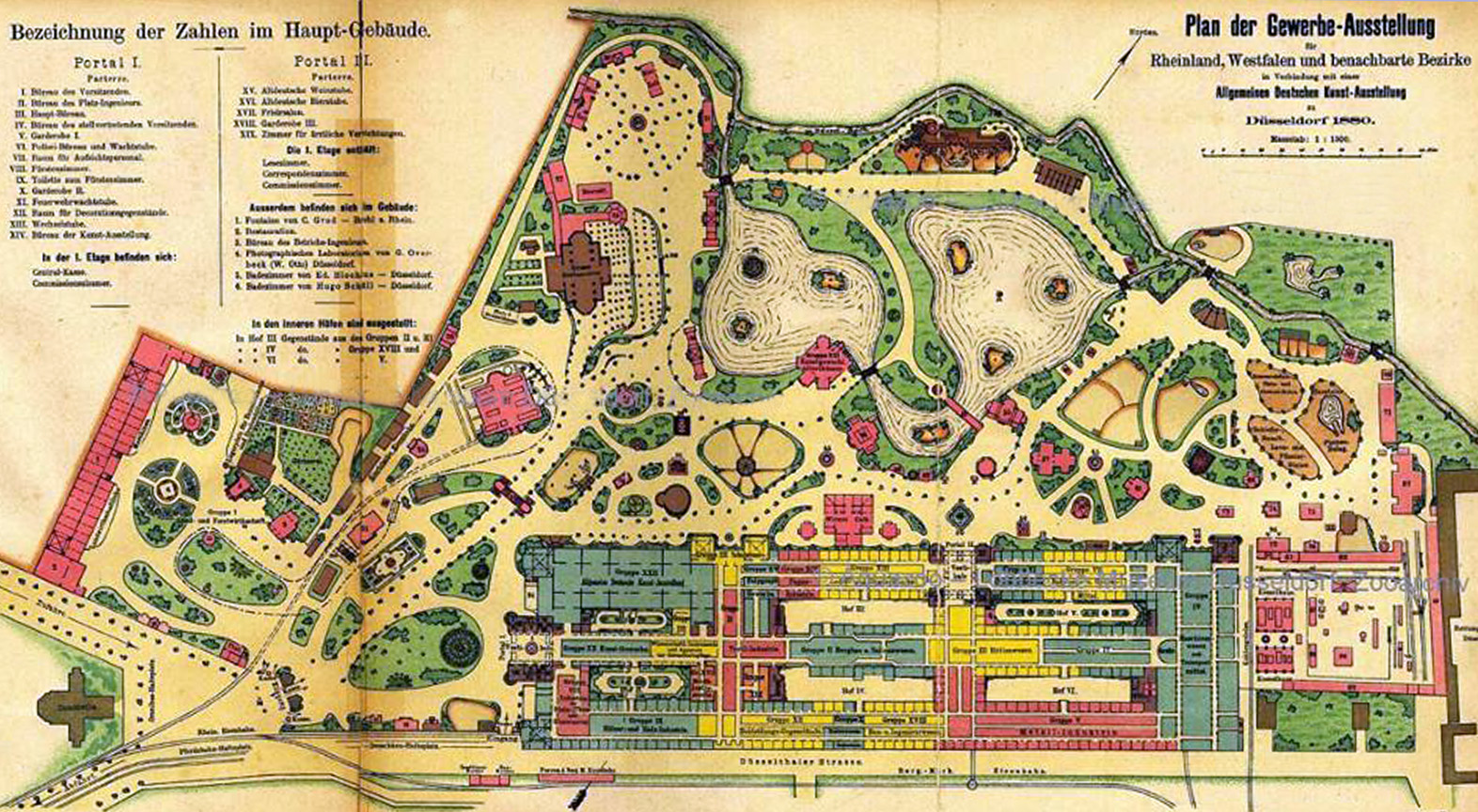 Plan Gewerbe-Ausstellung für Rheinland, Westfalen mit den Grundzüge des Zoos 1880